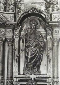 Detall del retaule de Santa Maria del Mar. Escultura del Sant Pau realitzada per Domènec Rovira